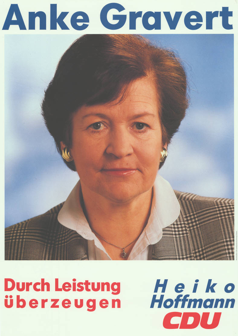 Anke Gravert Durch Leistung überzeugen Heiko Hoffmann CDUAbbildung:PorträtfotoPlakatart:Kandidaten-/Personenplakat mit PorträtAuftraggeber:Verantw.: CDU Landesverband Schleswig-HolsteinObjekt-Signatur:10-012 : 705Bestand:Landtagswahlplakate Schleswig-Holstein (10-012)GliederungBestand10-18:Landtagswahlplakate Schleswig-Holstein (10-012) » CDULizenz:KAS/ACDP 10-012 : 705 CC-BY-SA 3.0 DE